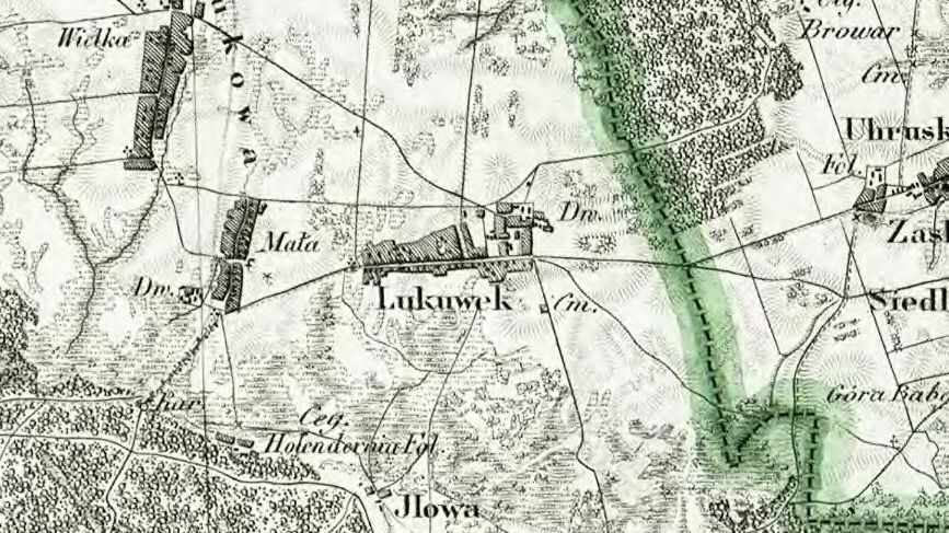 Łukówek (powiat chełmski) na mapie topograficznej Królestwa Polskiego z 1839 roku